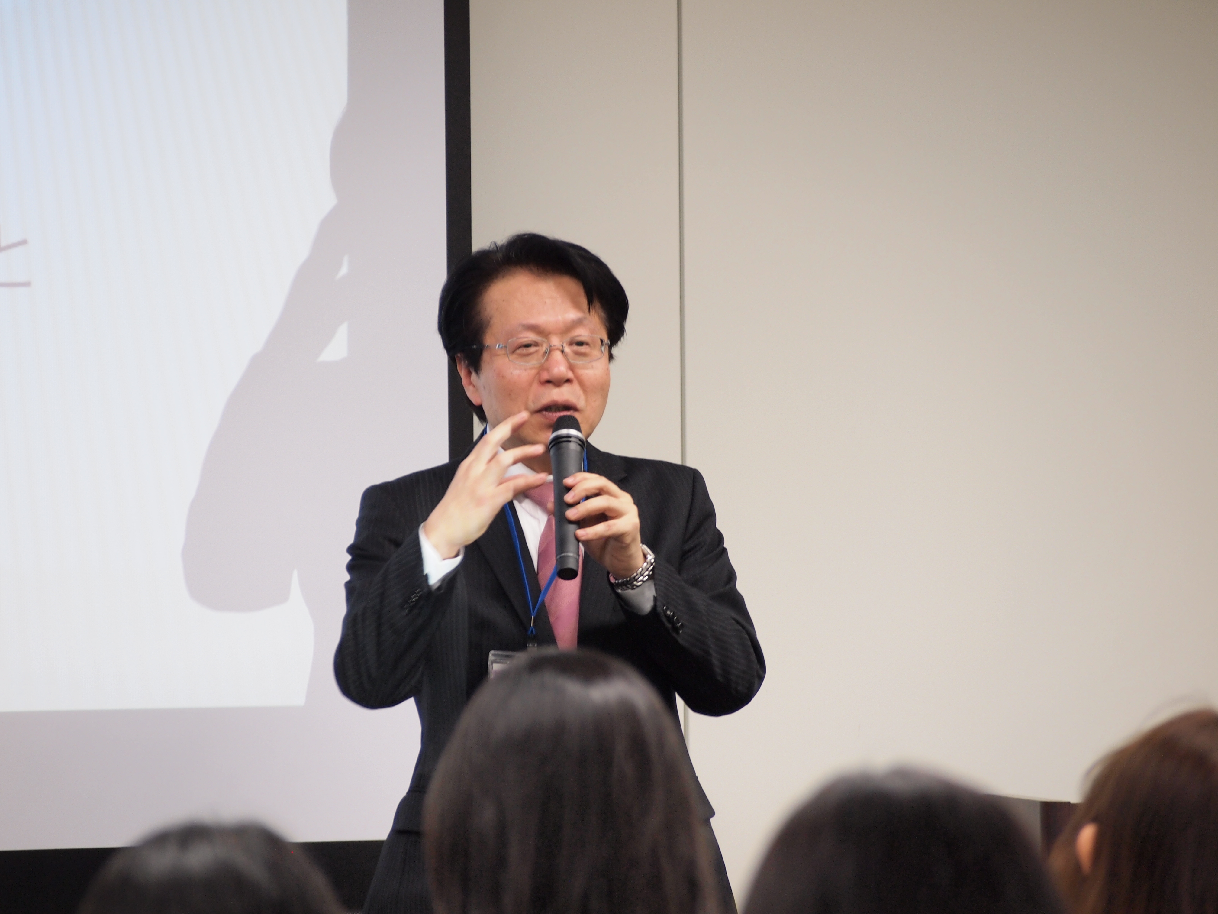 かしこい塾の使い方 関西セミナー